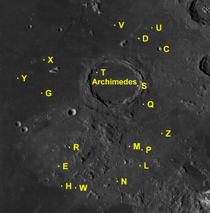 Cráter lunar Archimedes. Cráteres satélite. (Imagen LRO)